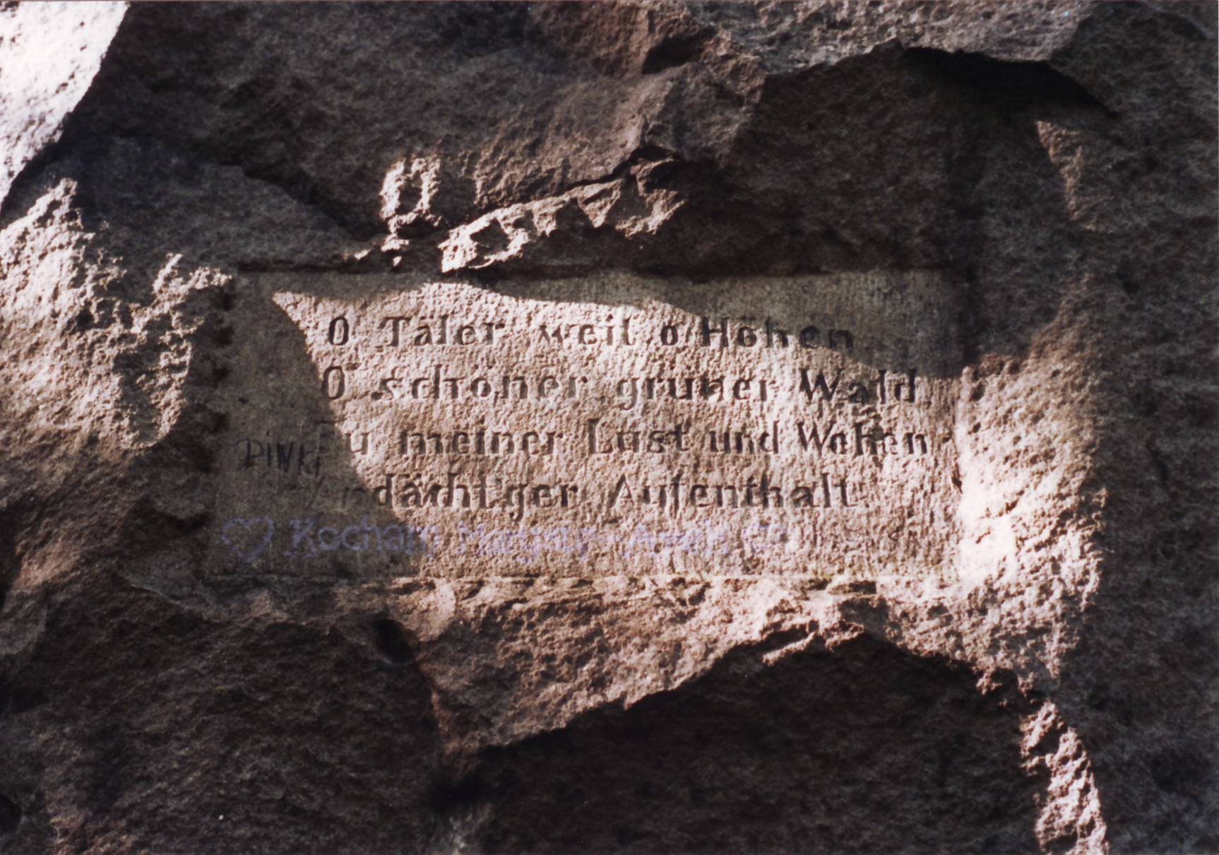 Inschrift auf der Rückseite des Denkmals in Dębowiec. „O Thäler weit, o Höhen, o schöner, grüner Wald, du meiner Lust und Wehen andächt'ger Aufenthalt!“ »der ganze Liedtext